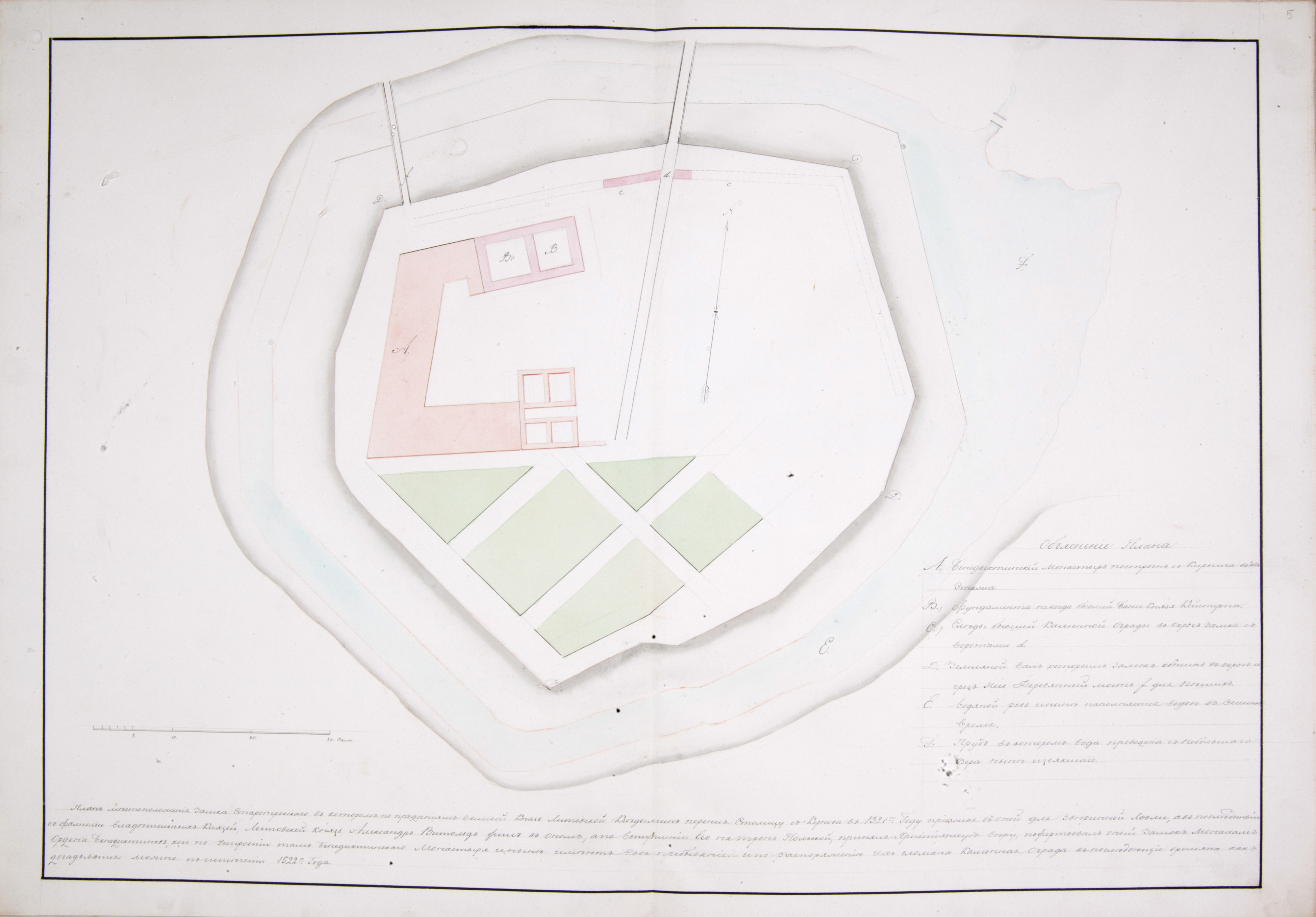 Беларуская (тарашкевіца): Трокі (Troki), паўвыспа Бэрнардынская (Bernardynskaja). Касьцёл і кляштар бэрнардынаў